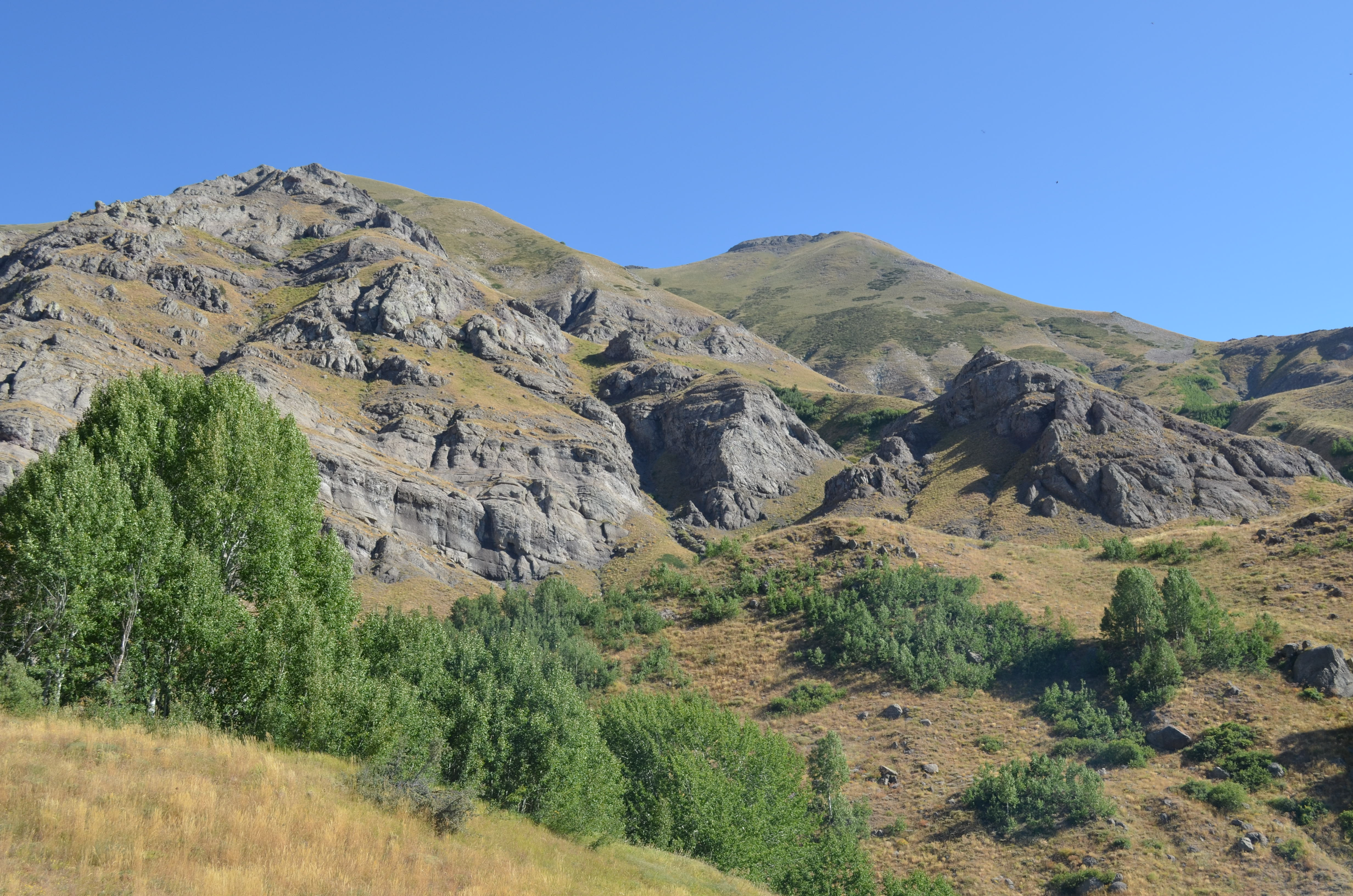 Bedro Dağı